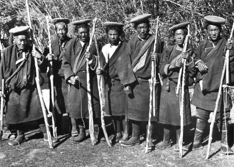 Gyantse, Knüppelgarde